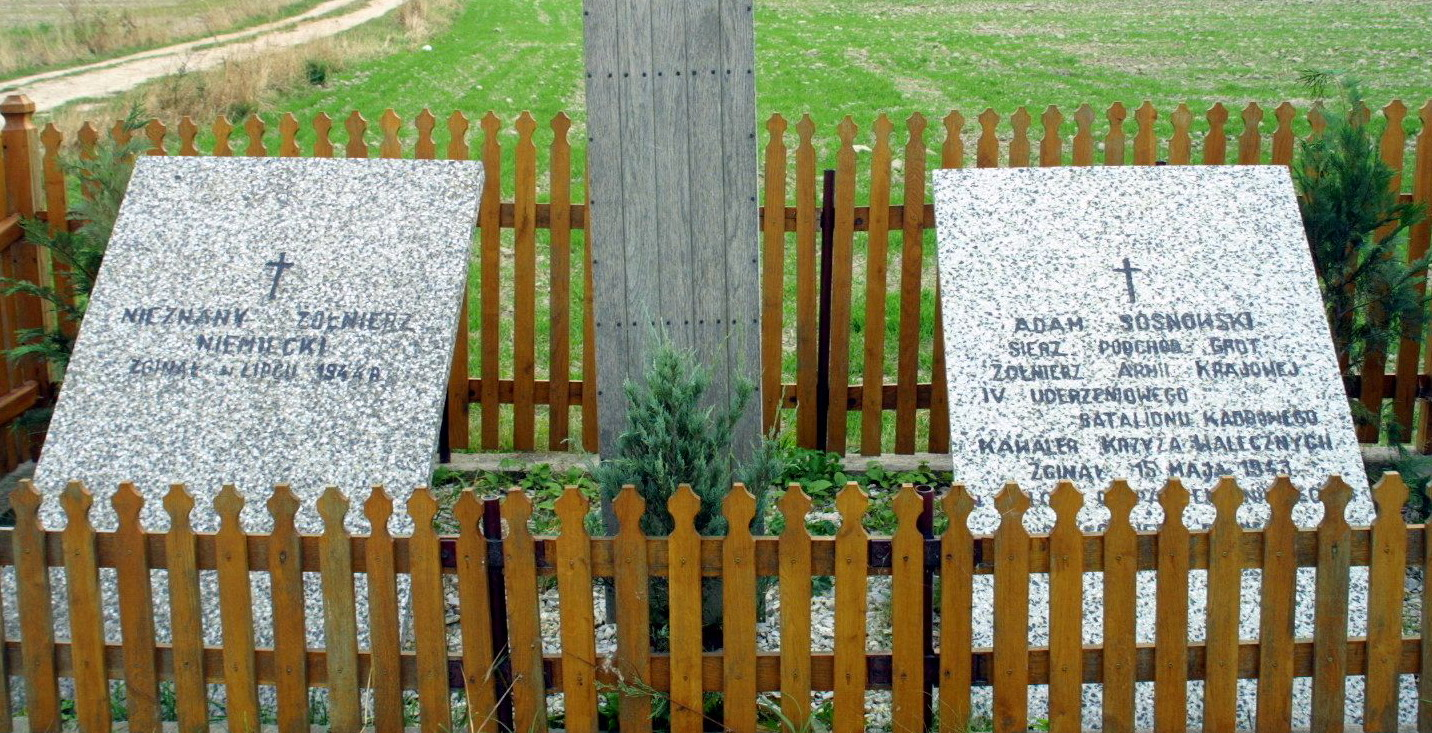 Wymysły. Tablice upamiętniające śmierć żołnierza AK i żołnierza niemieckiego.